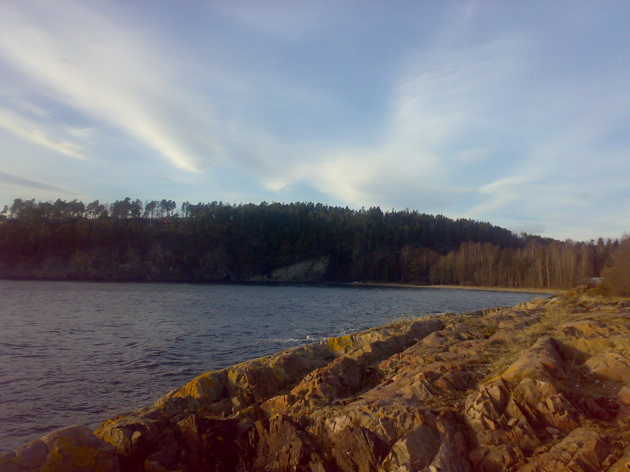 Ersvika, Hurum, norway